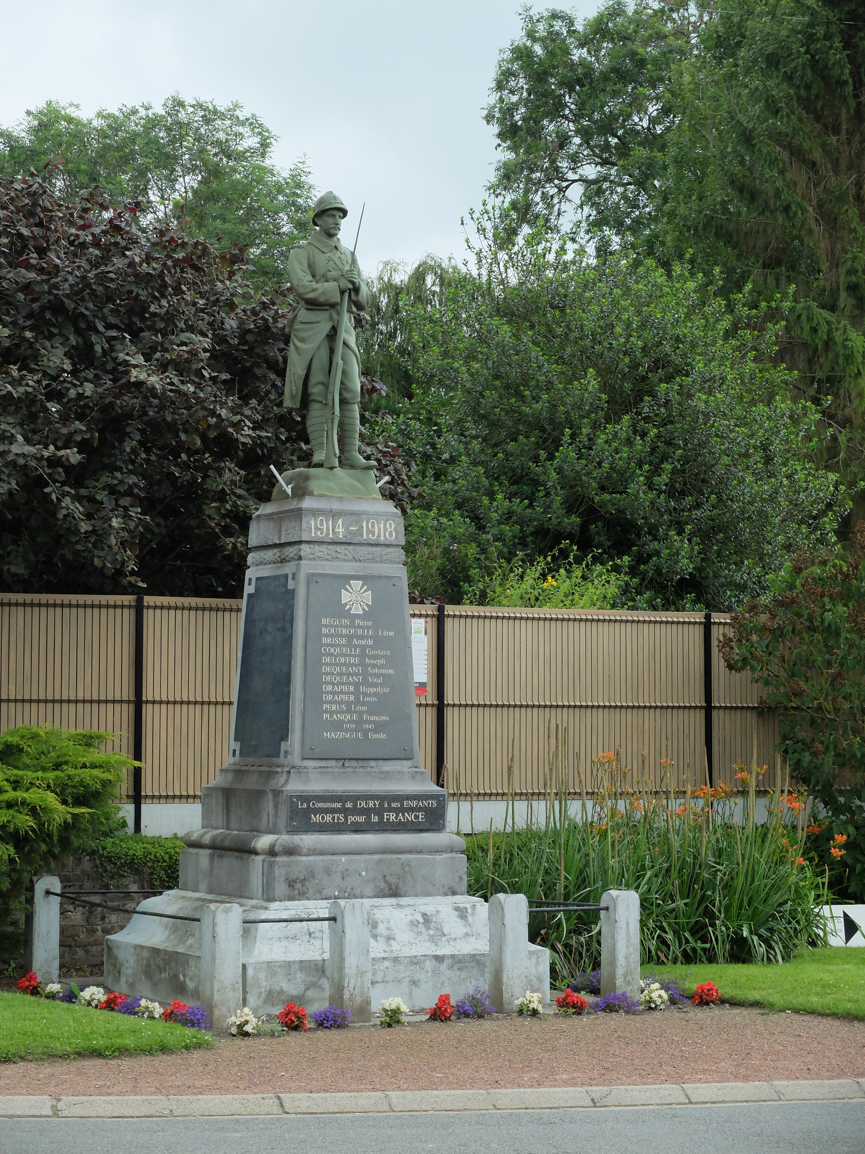 Vue du monument aux morts de Dury (Pas-de-Calais).